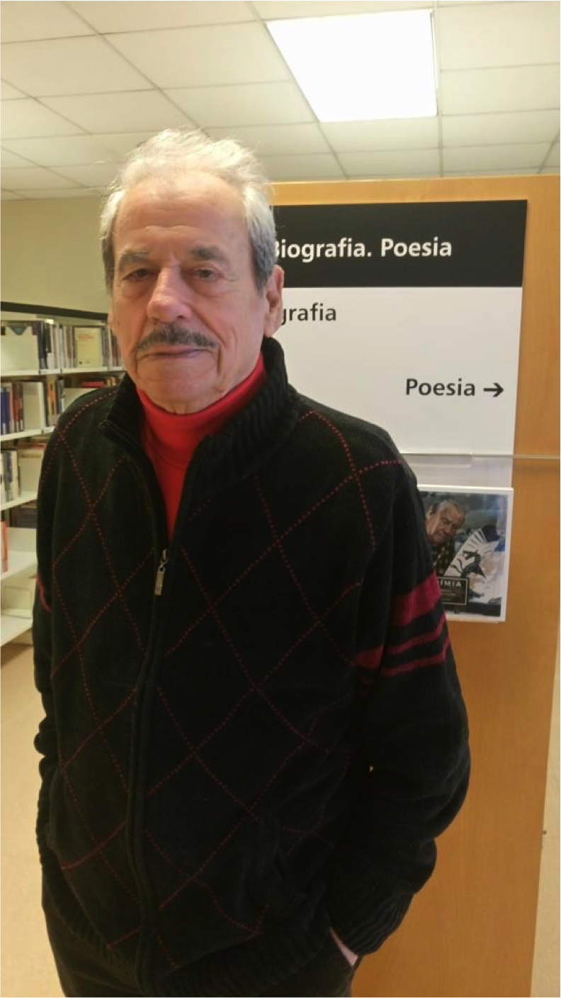 Paulí Collado, artista i escultor en forja de Cornellà de Llobregat, a la Biblioteca Central de la ciutat.